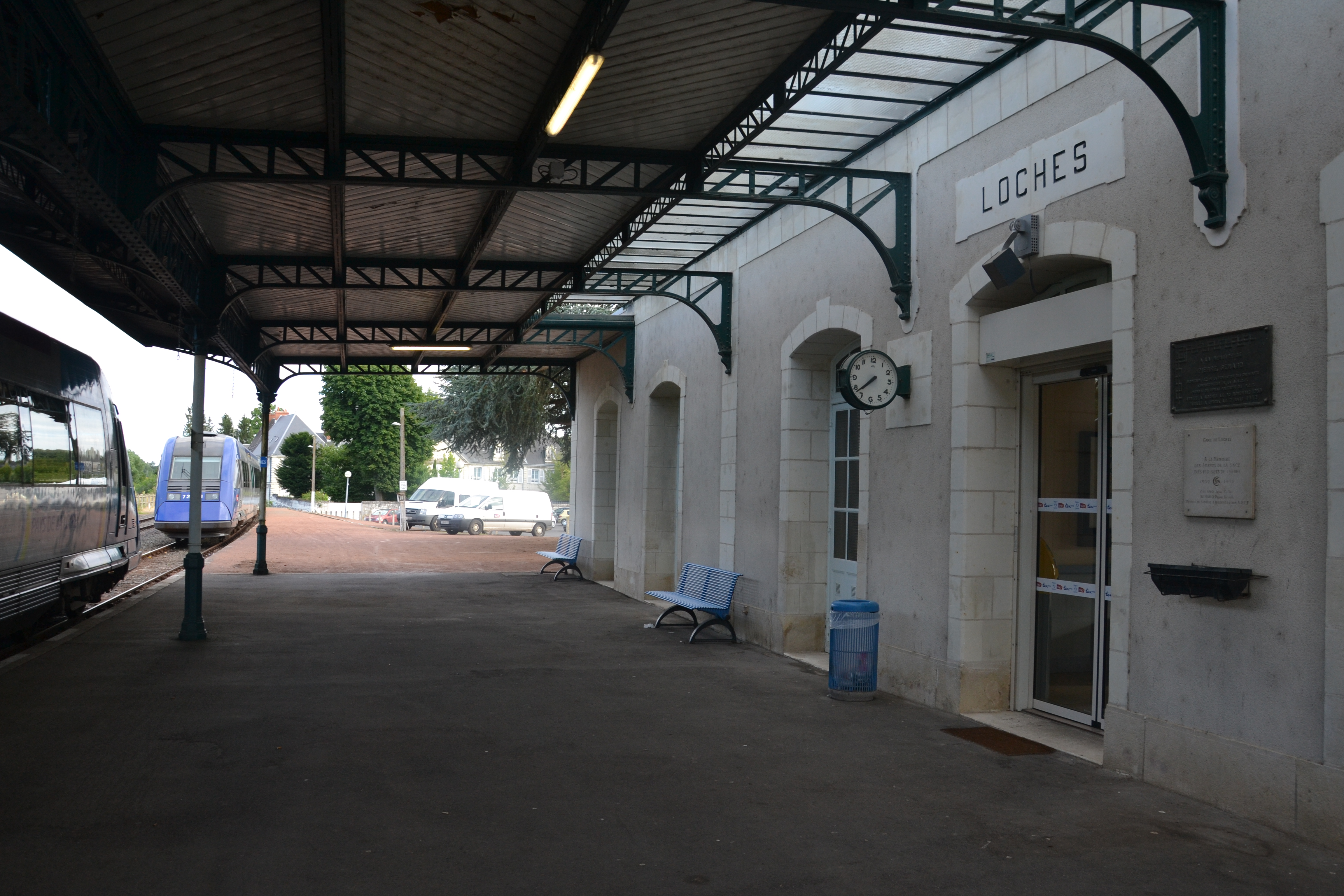 Marquise du quai de la gare